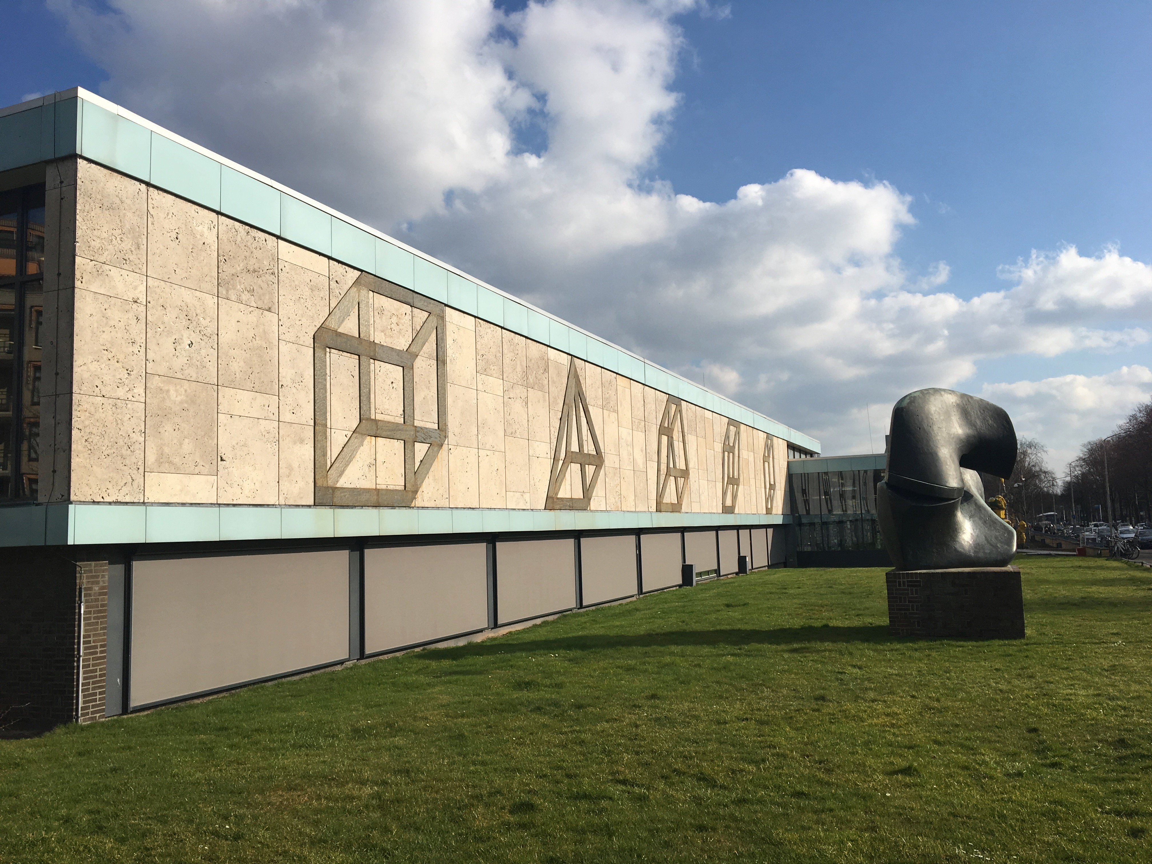 Schamhartvleugel